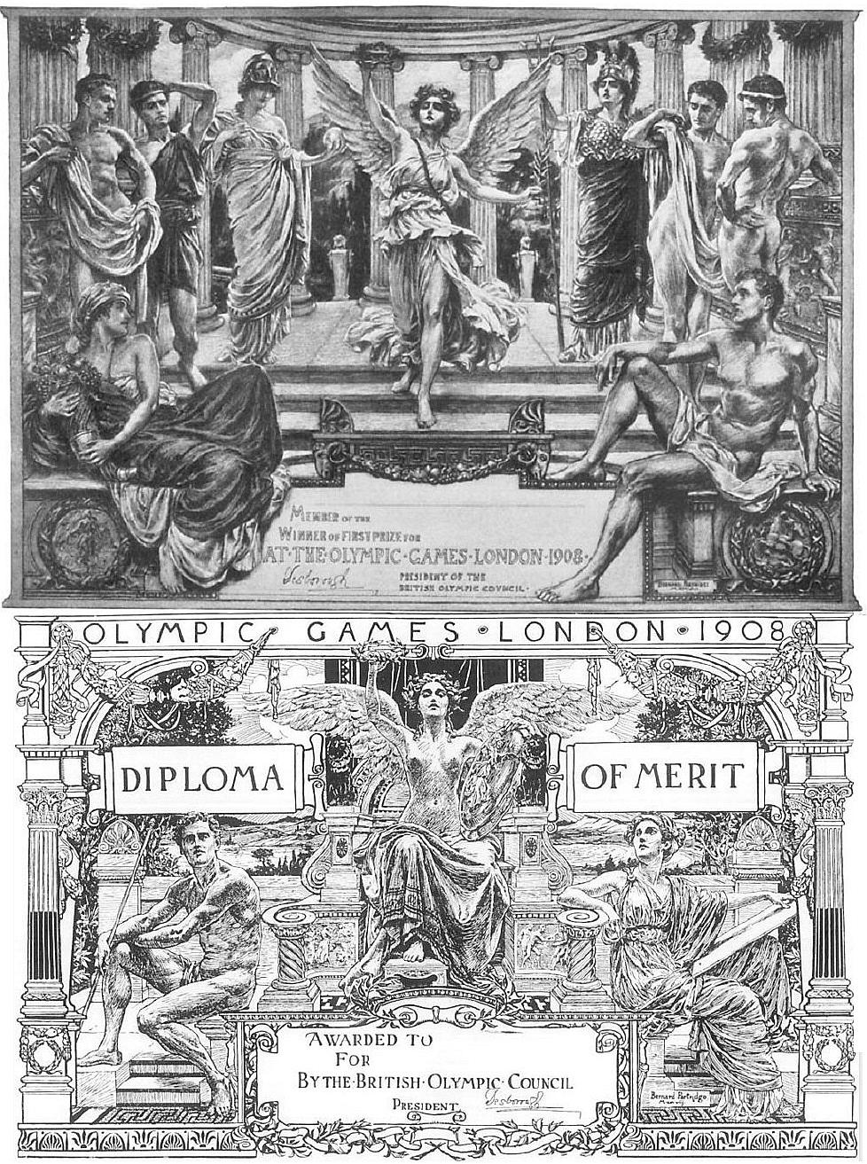 Diplomes du Mérite, remis aux Lauréats des Jeux Olympiques de 1908 à Londres.